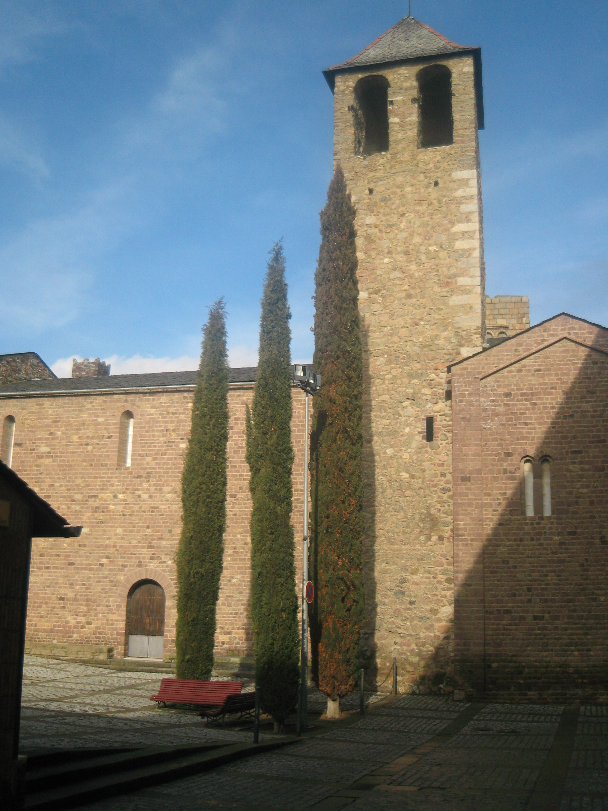 església de Sant Miquel, d'estil romànic, erigida pel bisbe Sant Ermengol.